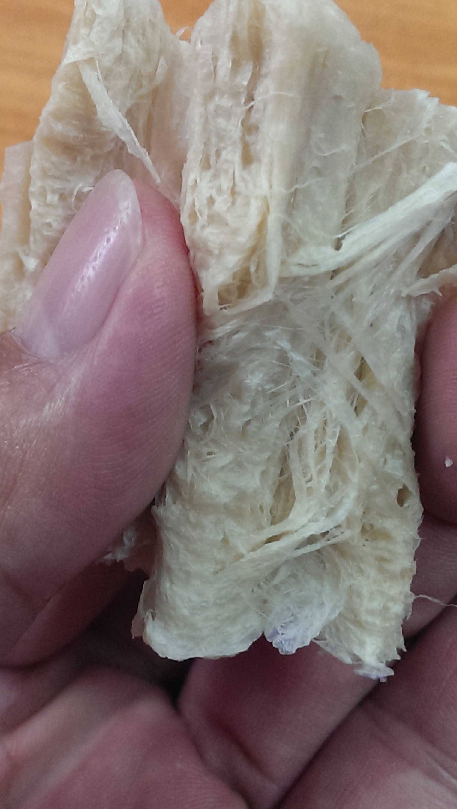 此為素肉復水後，剝開後的絲狀組織，可拆細後，再重組，也可直接料理